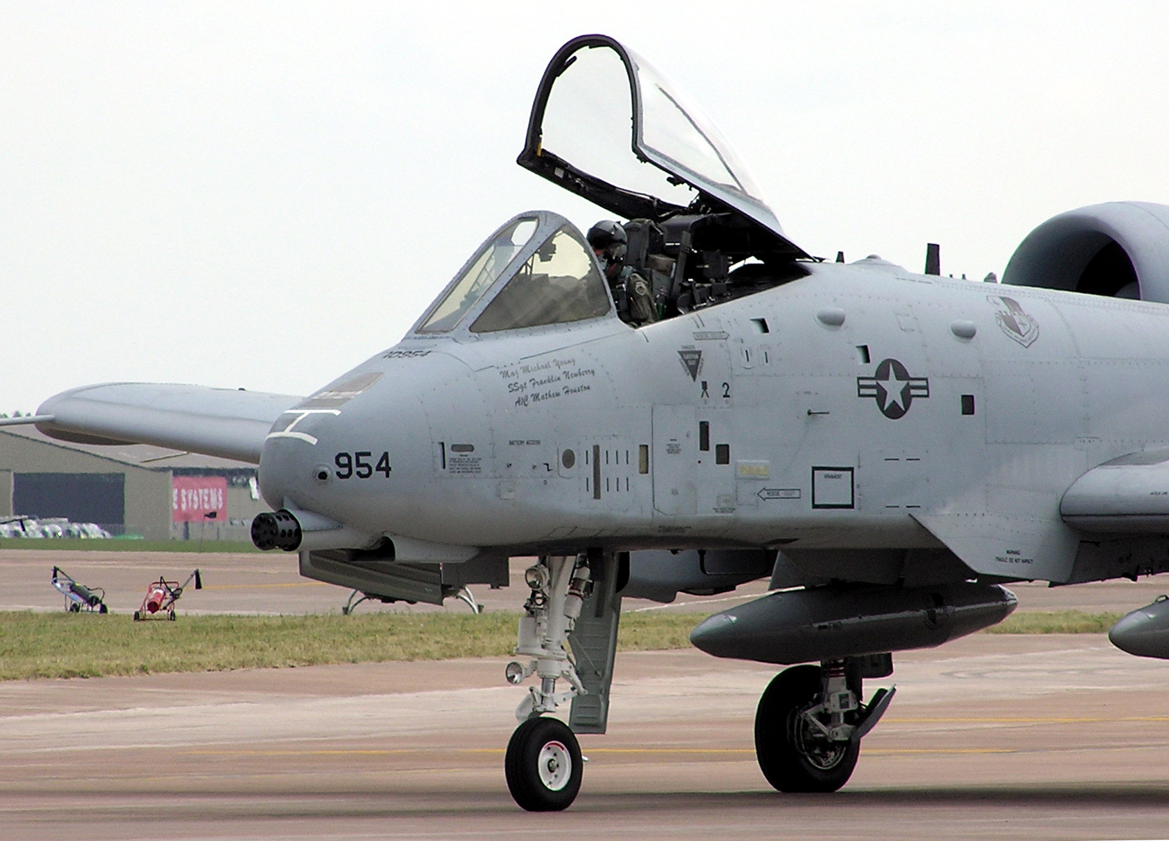 Vista cercana de un Thunderbolt USAF OA/A-10A Thunderbolt, nose view while taxying at the Royal International Air Tattoo, Fairford, Gloucestershire, England. Photographed by Adrian Pingstone in July 2005 and released to the public domain.